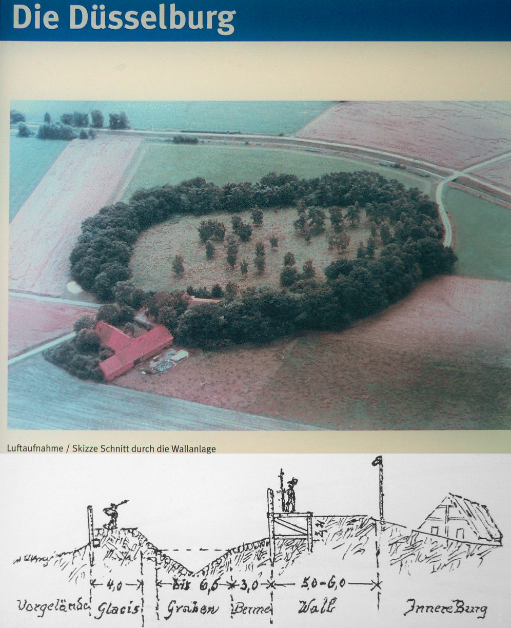 Luftbild der Düsselburg